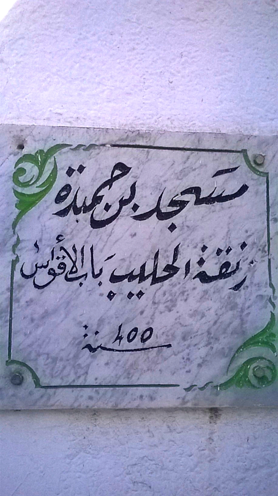 Mosquée Ben Hamida, bab lakouas, la médina de Tunis